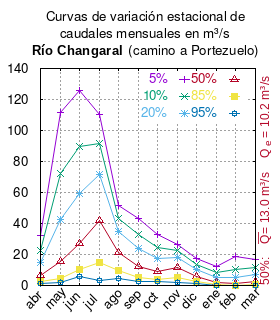 Curvas de variación estacional del río Changaral camino a Portezuelo. # Dirección General de Aguas # Diagnóstico y clasificación de los cursos y cuerpos de agua según objetivos de calidad. Cuenca del río Itata. # Santiago de Chile # Ministerio de Obras Públicas (Chile) # 2004 # url: # urlarchivo: # Tabla 4.6: Río Changaral camino a Portezuelo (m3/s) pág. 46 mes 5% 10% 20% 50% 85% 95% abr 32.347 22.566 14.589 6.339 2.270 1.242 may 111.901 72.126 42.343 15.243 4.251 1.956 jun 125.548 89.506 59.409 27.142 10.342 5.868 jul 110.432 91.437 71.636 41.728 15.160 3.105 ago 51.540 43.237 34.580 21.506 9.892 4.622 sep 42.906 32.907 23.729 12.362 5.004 2.594 oct 33.059 24.824 17.546 9.040 3.994 2.472 nov 26.584 22.570 18.242 11.362 4.899 1.917 dic 17.587 13.710 10.102 5.537 2.486 1.456 ene 12.227 8.141 4.974 1.940 0.608 0.308 feb 18.986 10.390 5.006 1.240 0.222 0.081 mar 16.787 11.360 7.050 2.764 0.774 0.299 This plot was created with Gnuplot.